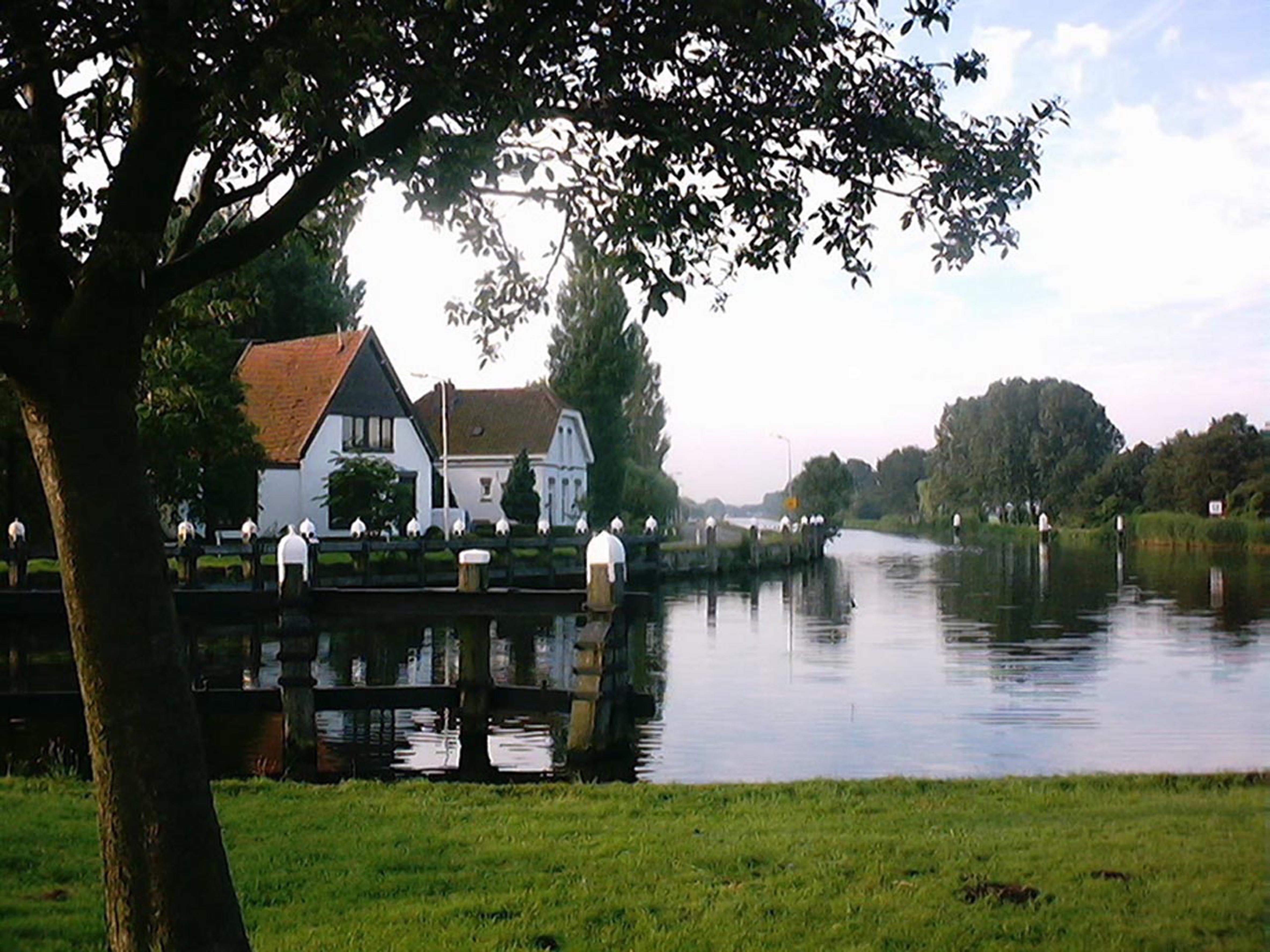 Tolhuissluis